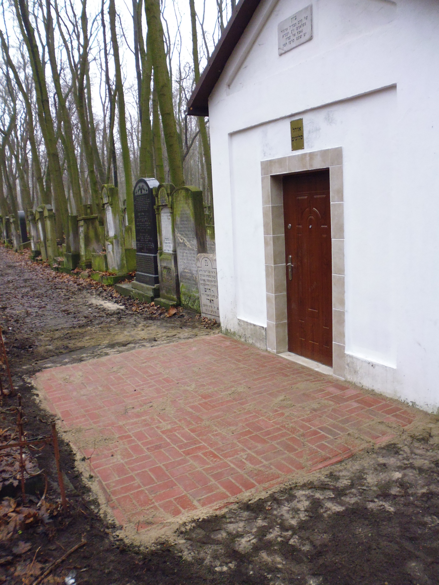 מחוץ לאוהל החדש